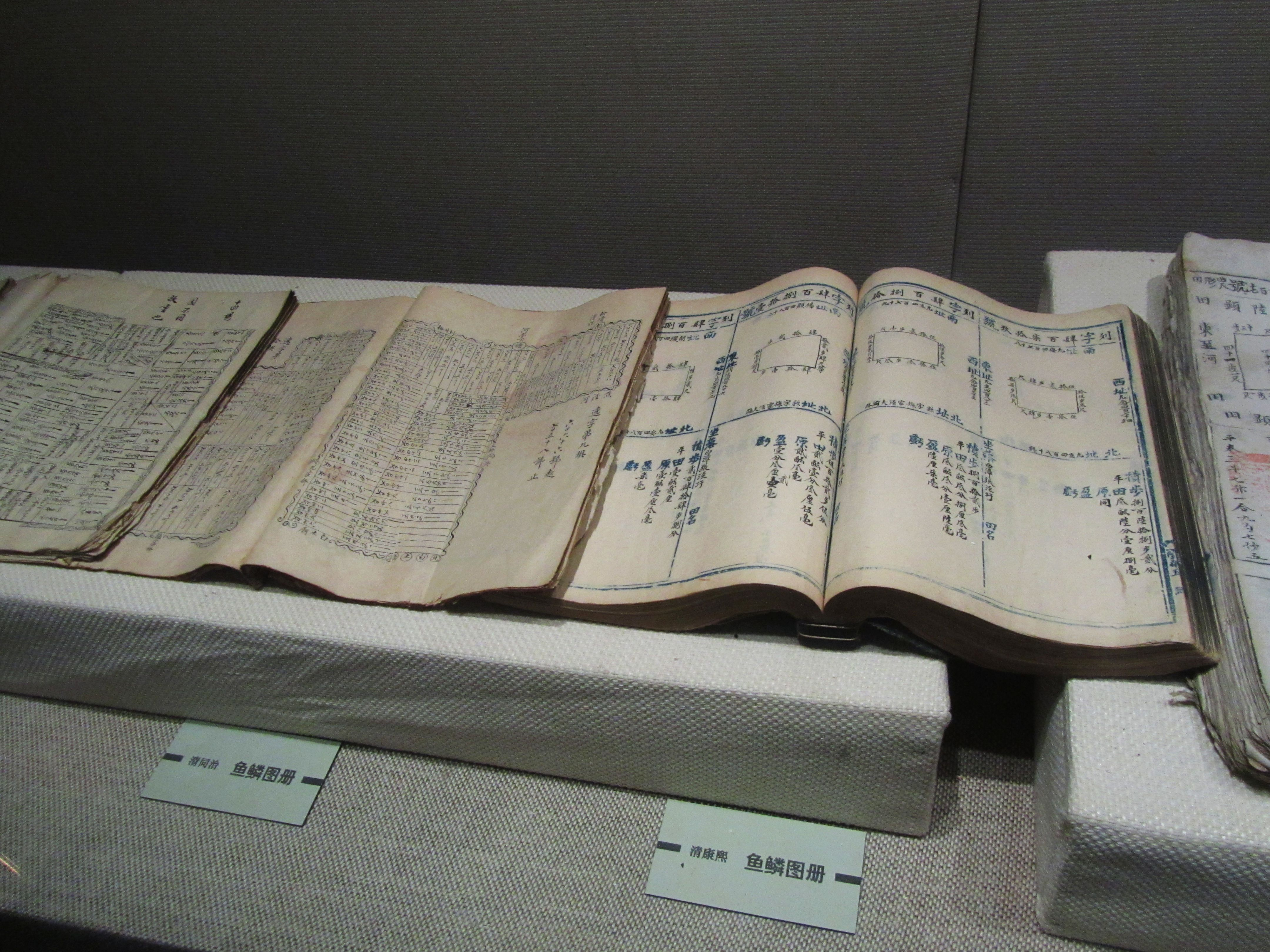 无锡博物馆藏清同治和康熙鱼鳞图册。